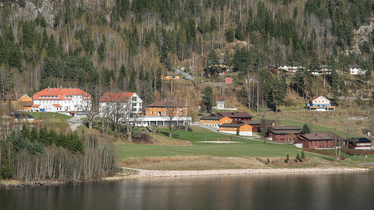 Kvitsund Gymnas med internatene ned mot Sundkilen, sett fra Urdbø.